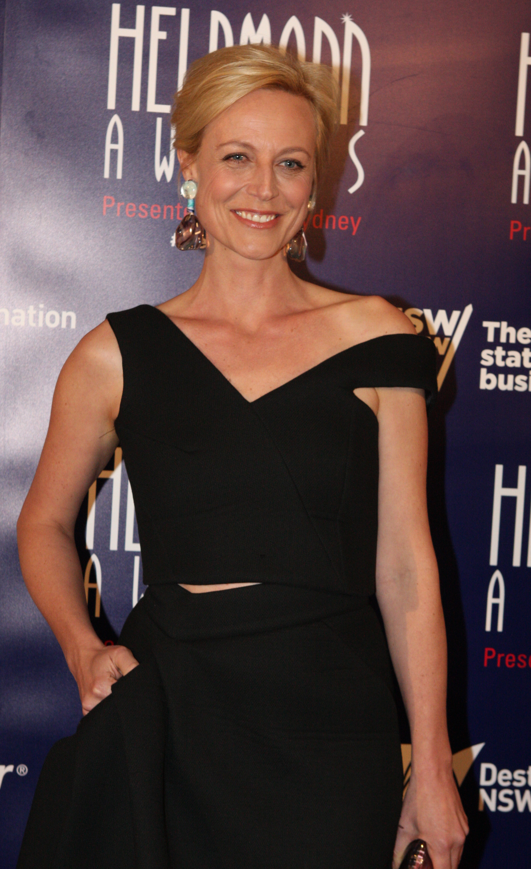 Marta Dusseldorp